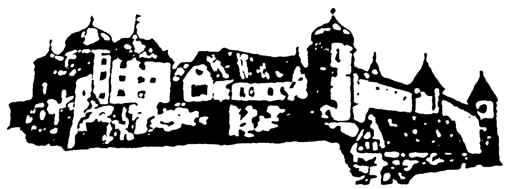 Silhouette der Burg Harburg